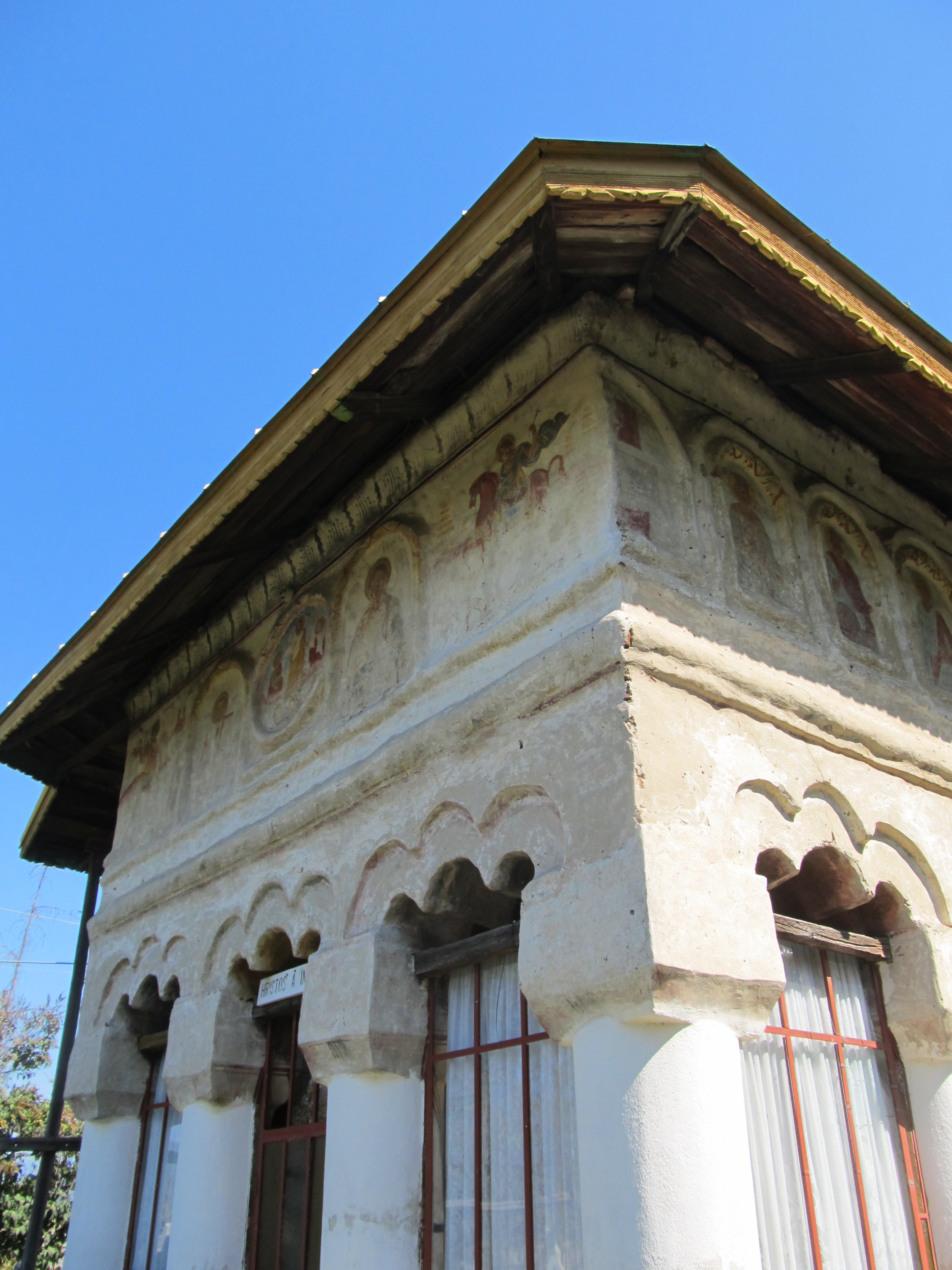 Biserica "Schimbarea la Față"